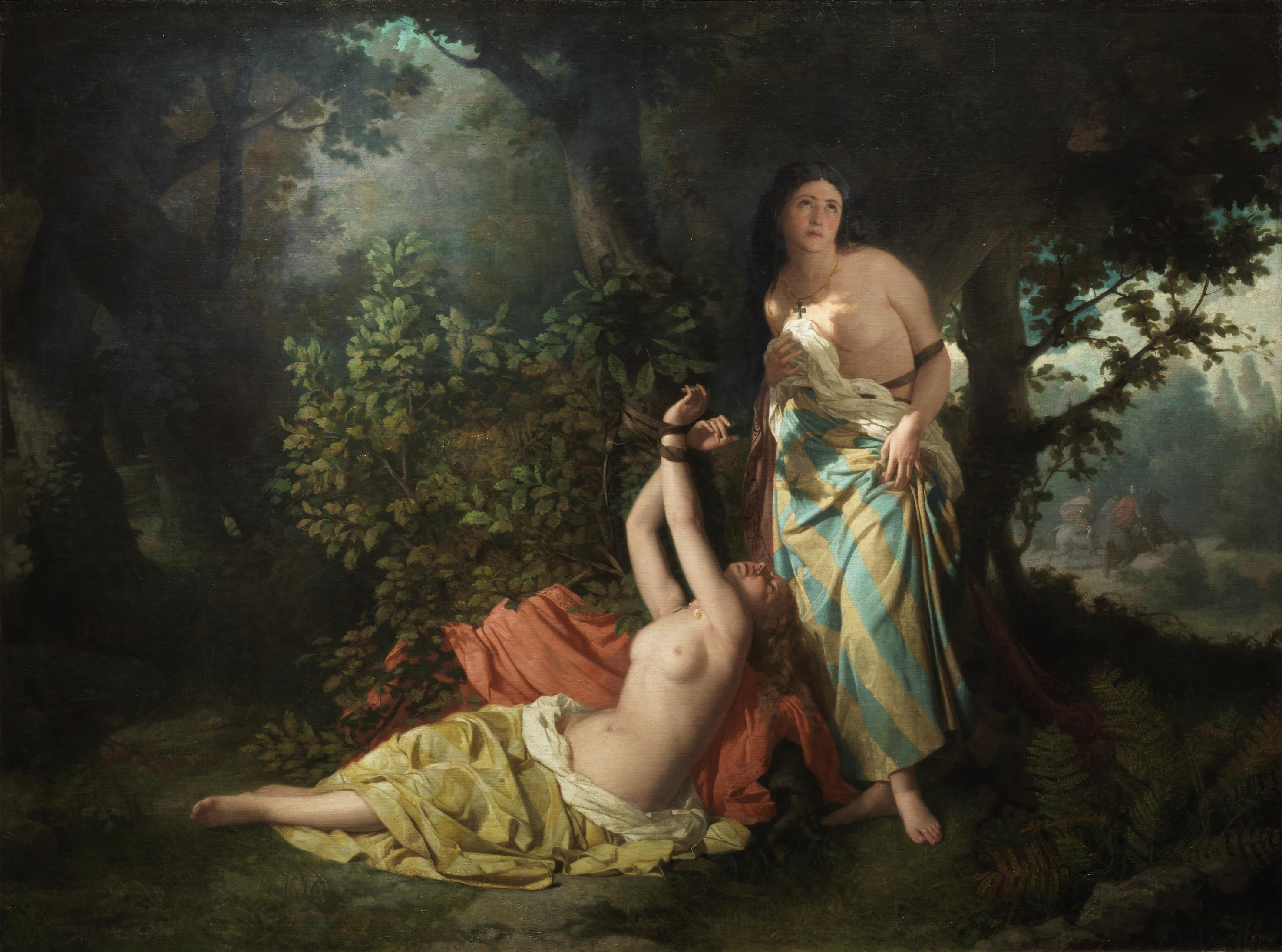 Las hijas del Cid. Óleo en el que se representa el episodio del ultraje a las hijas del Cid. Obra de Dióscoro Teófilo Puebla Tolin conservada en el Museo del Prado.